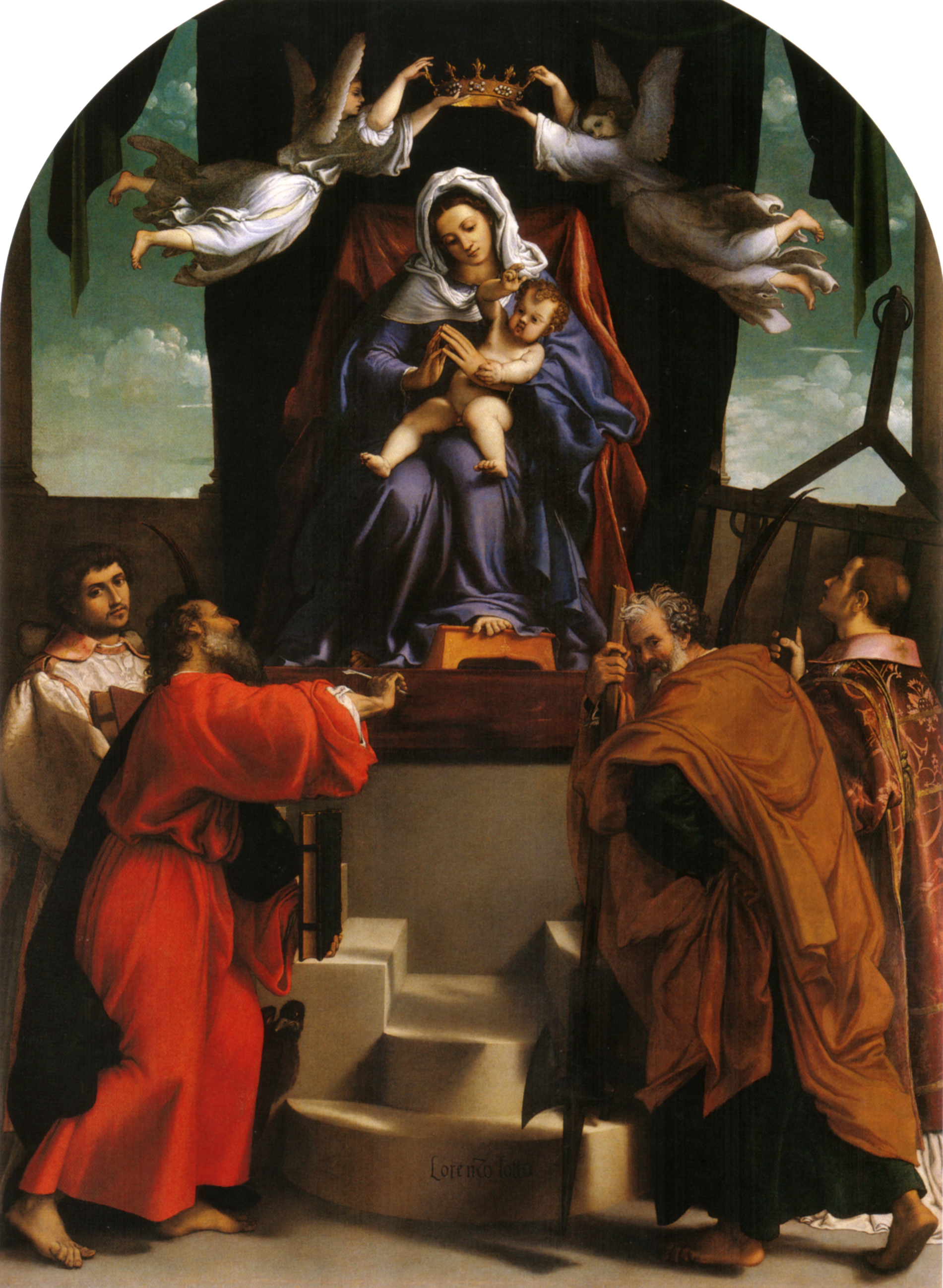 ! this is not Pala in S Giacomo dell'Orio Venice but Pala Alabarda Pinacoteca Civica Francesco Podesti Ancona